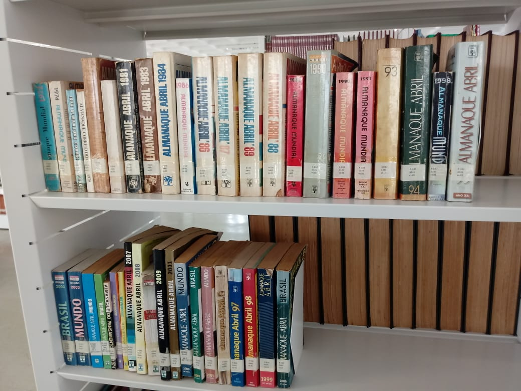 Almanaquiário da Biblioteca Municipal de Sobral. Tem almanaques abril e o almanaque mundial.